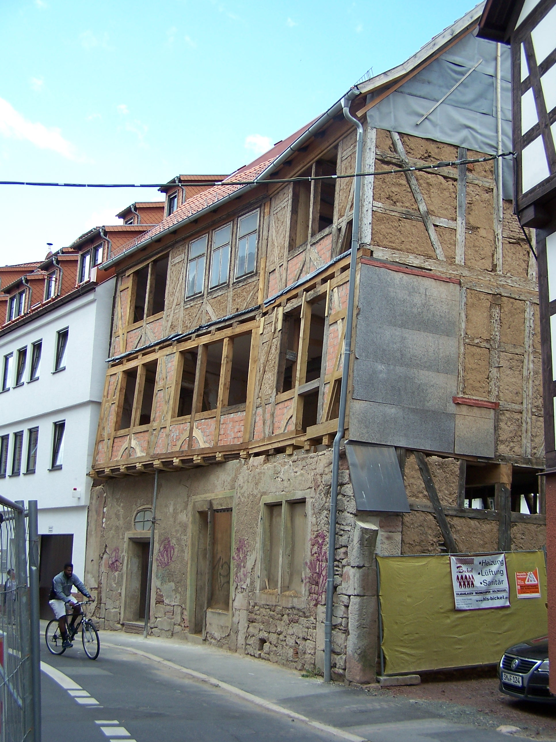 Ansicht des Hauses Hoffnung 68 in der Altstadt von Schmalkalden.